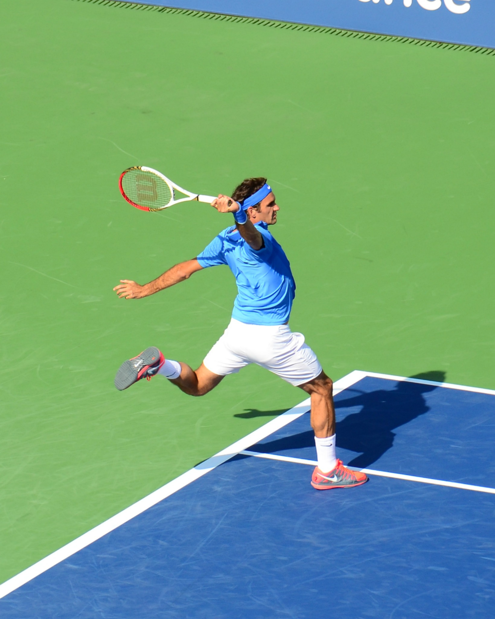 Roger Federer